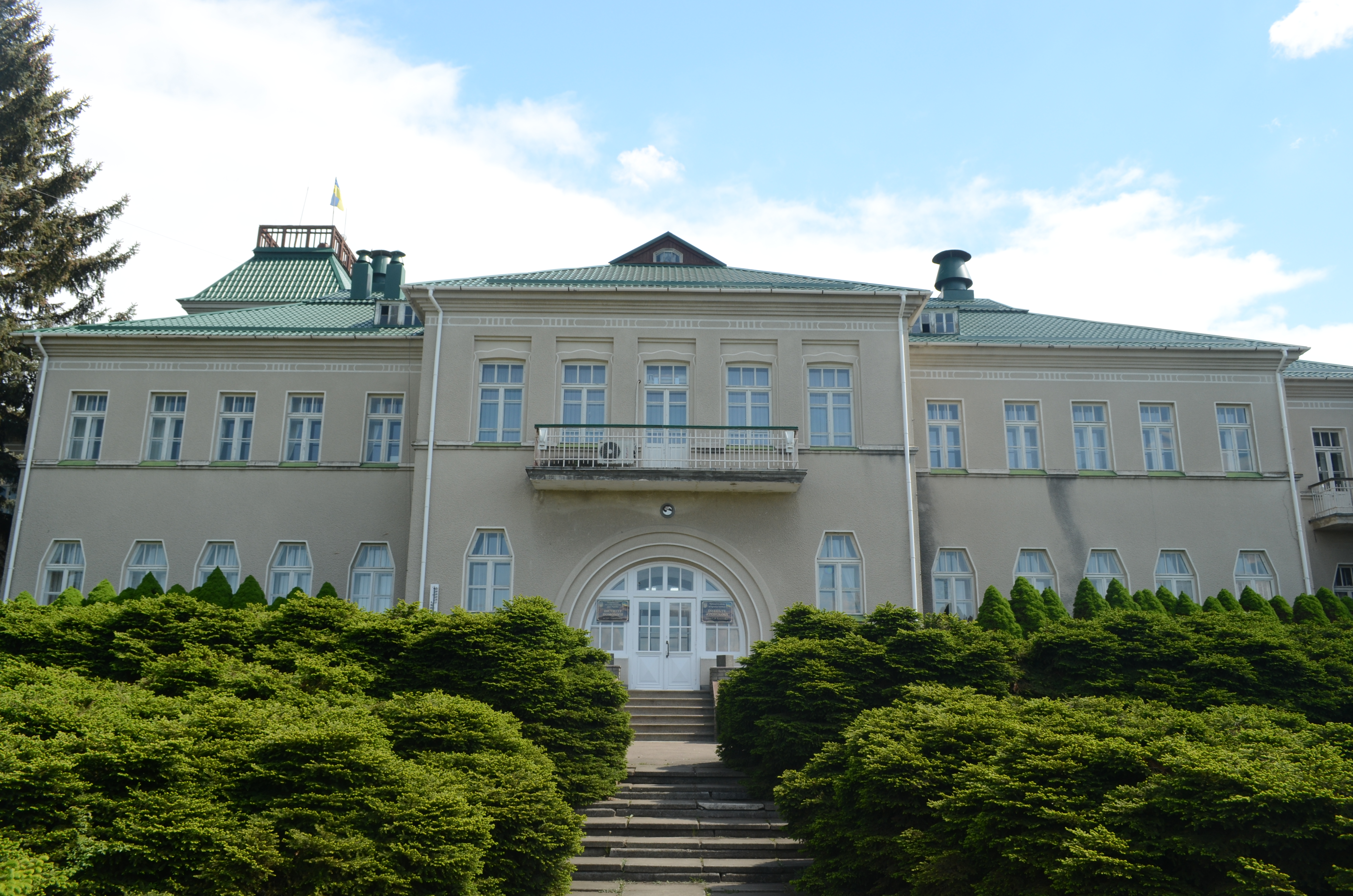 Институт помологии в Млиеве, Городищенский р-н, Черкасская обл., Украина